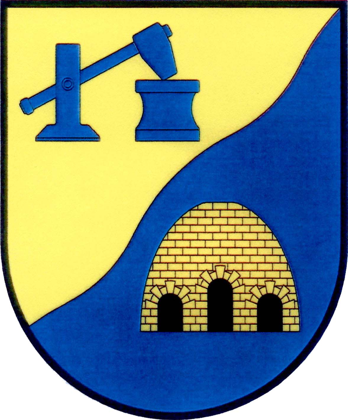 Znak obce Mokrovraty.